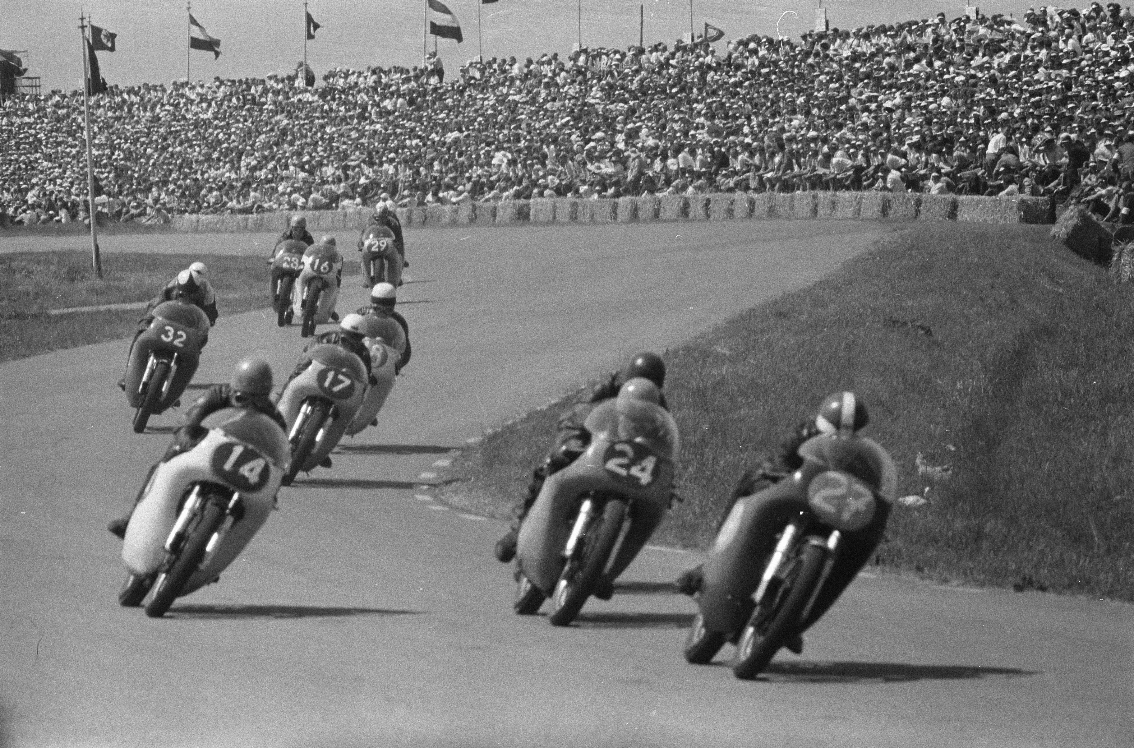 Collectie / Archief : Fotocollectie Anefo Reportage / Serie : TT Assen 1960 Beschrijving : Rennersveld 500cc Datum : 26 juni 1960 Locatie : Assen Trefwoorden : motorsport Instellingsnaam : TT Fotograaf : Bilsen, Joop van / Anefo Auteursrechthebbende : Nationaal Archief Materiaalsoort : Negatief (zwart/wit) Nummer archiefinventaris : bekijk toegang 2.24.01.05 Bestanddeelnummer : 911-3658